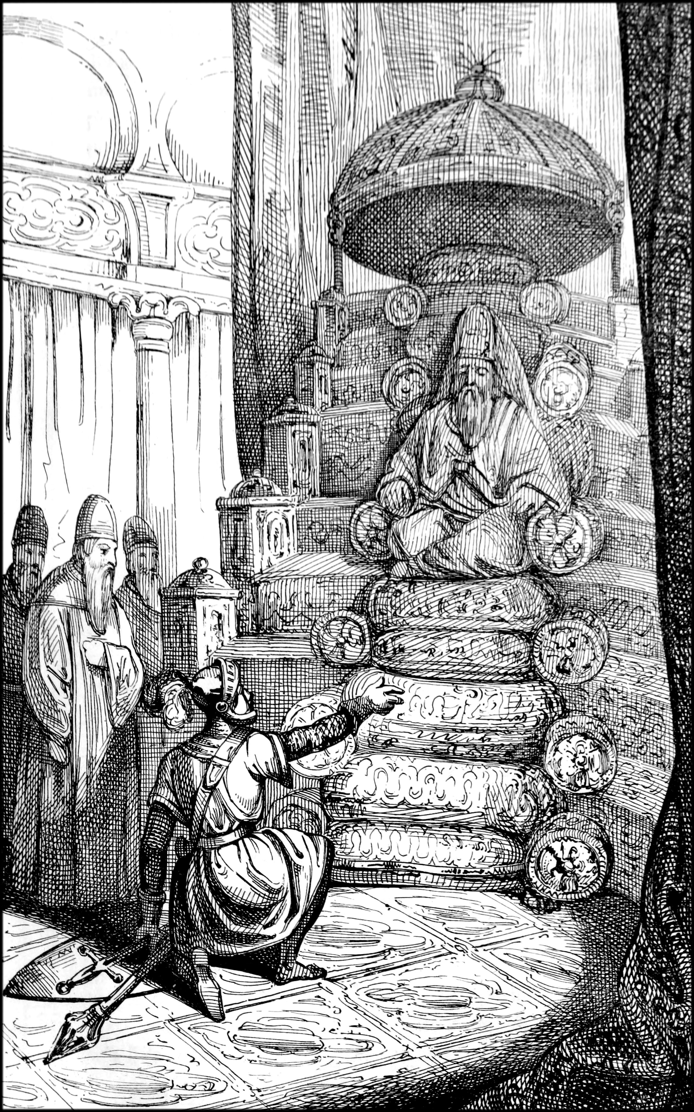 Illustrazione da Guerino detto il Meschino, di Andrea da Barberino, Milano, Tip. Guglielmini e Radaelli, 1841.